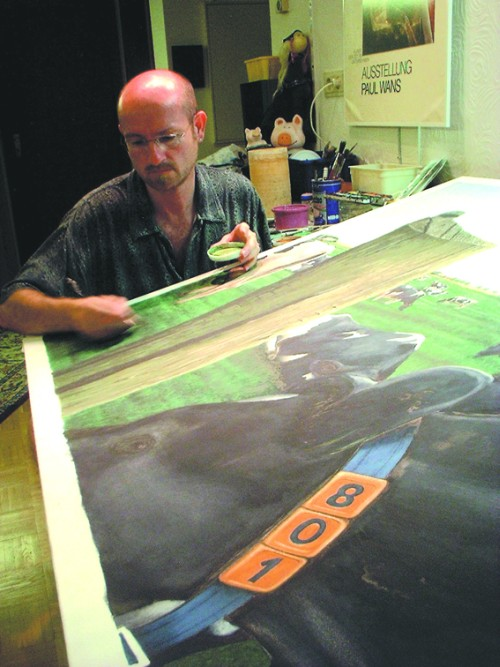 Der Maler Paul Wans im Atelier 2001-07-15. Own Work